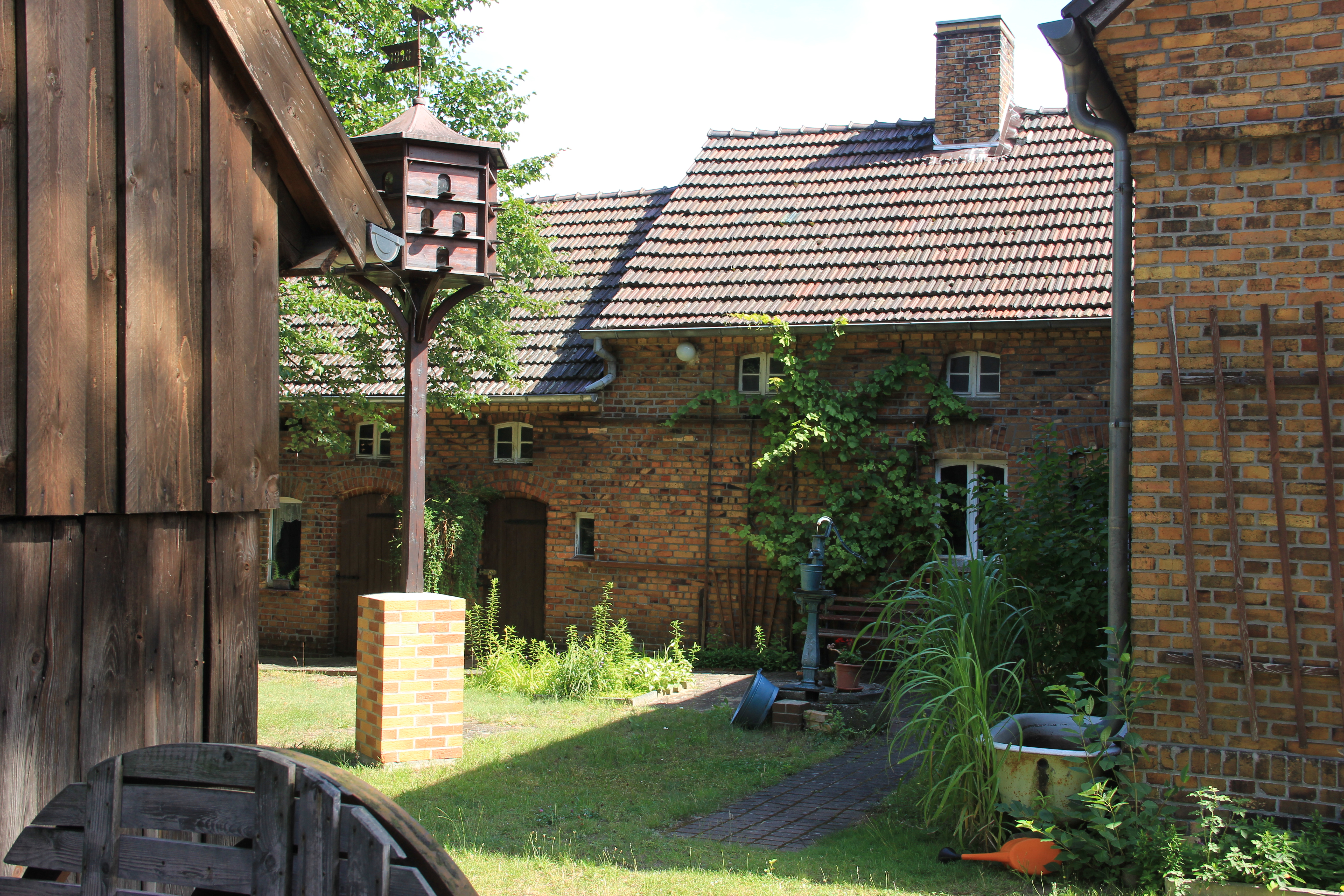 Strittmatters Laden - Blick in den Innenhof